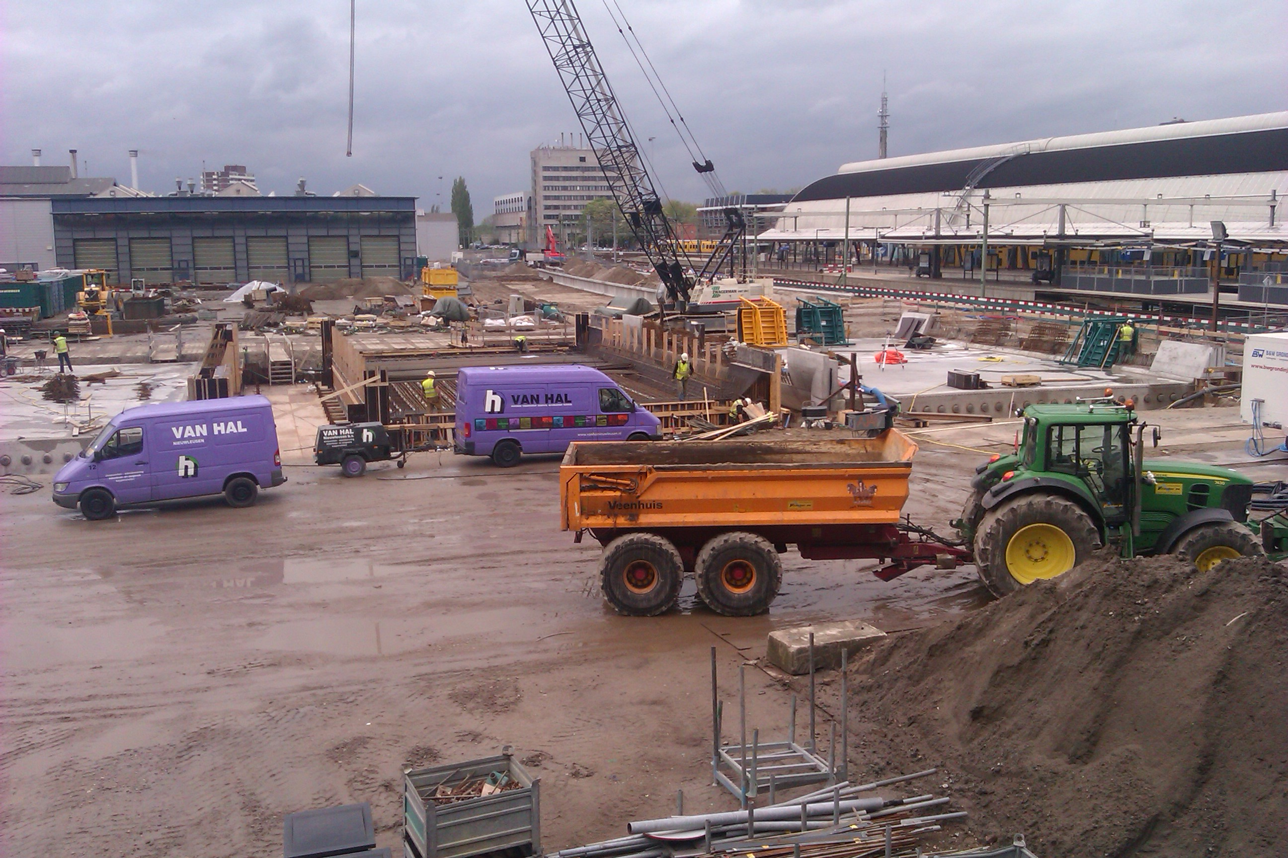 Overzichtsfoto van werkzaamheden ten behoeve van aanleg nieuwe spoorwegtunnel te Zwolle, medio 2012